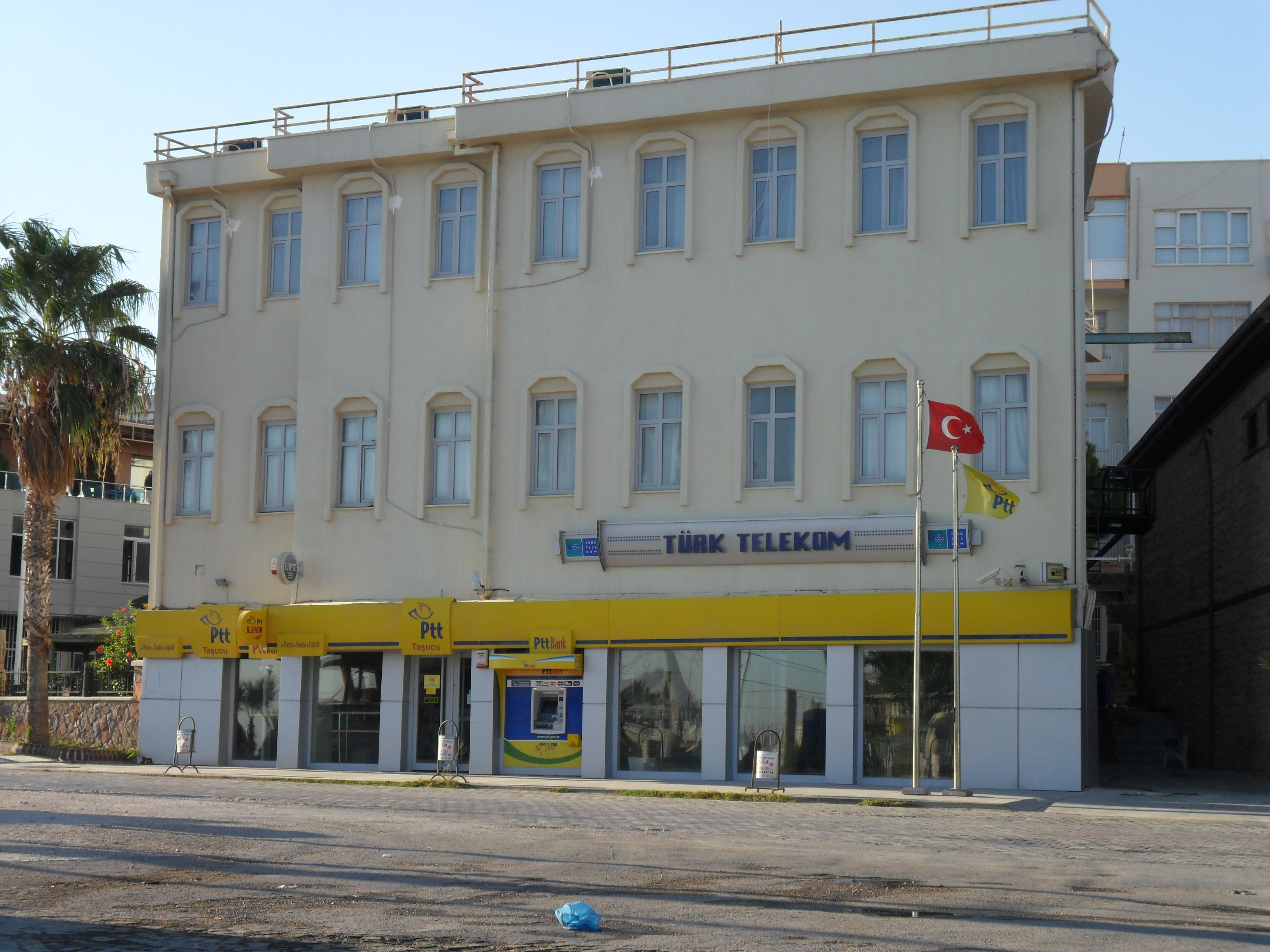 Taşucu belde merkezinde yer alan bina.